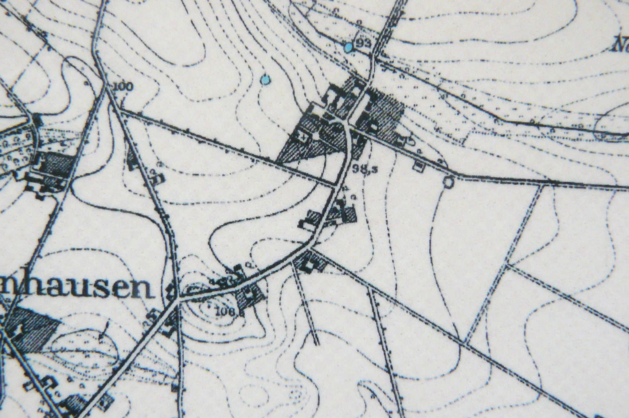 Mapa Piątkowa w Poznaniu - 1890.